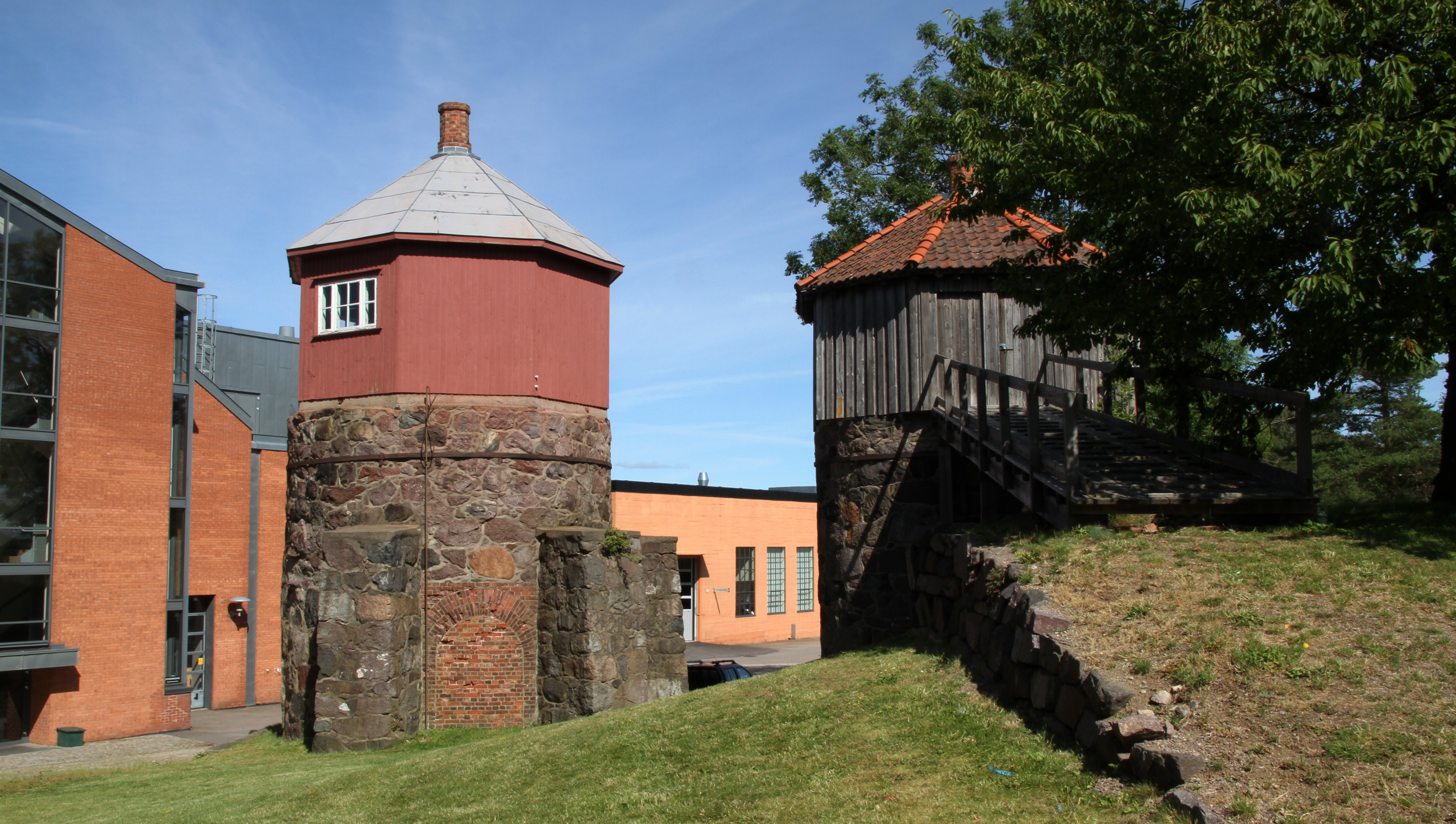 Kalkovnene på Karljohansvern, Horten, Vestfold, Norway